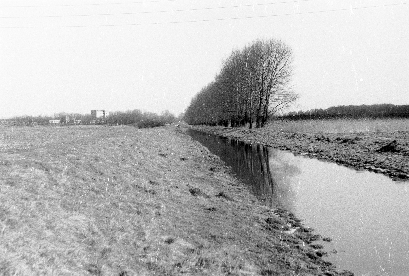 Kanał Nowa Ulga w stronę ul. Ostrobramskiej, wiosna 1983 r. Obszar obecnego Zespołu Przyrodniczo-Krajobrazowego „Zakole Wawerskie” na prawo od alei topól czarnych (część trzcinowiska zajęta jest przez Trasę Siekierkowską).